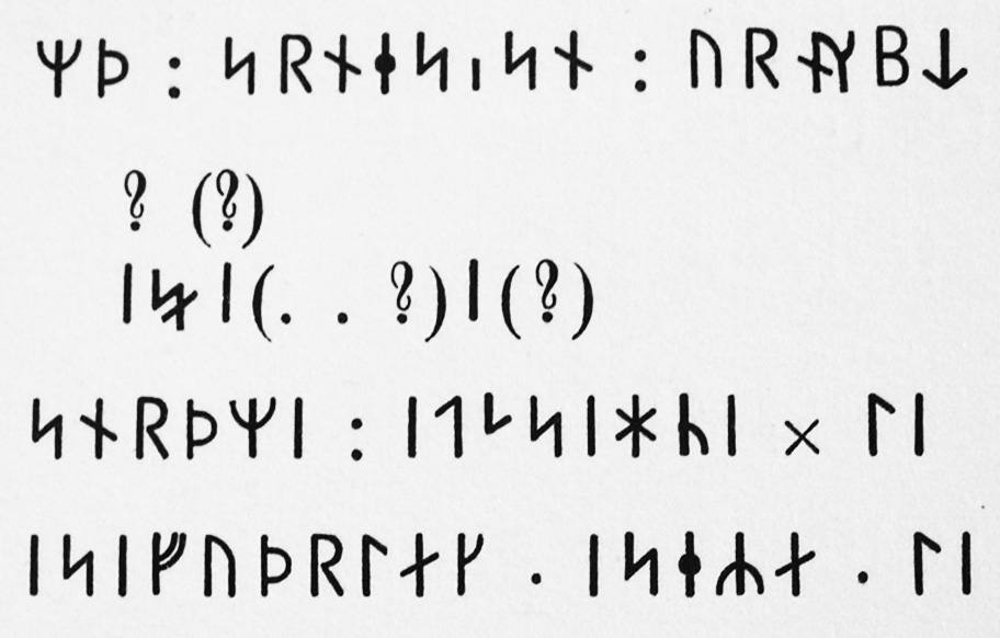 Ludvig Wimmers återgivning av runorna på Sørupstenen (De danske runemindesmærker, 1898-1901, s. 502).